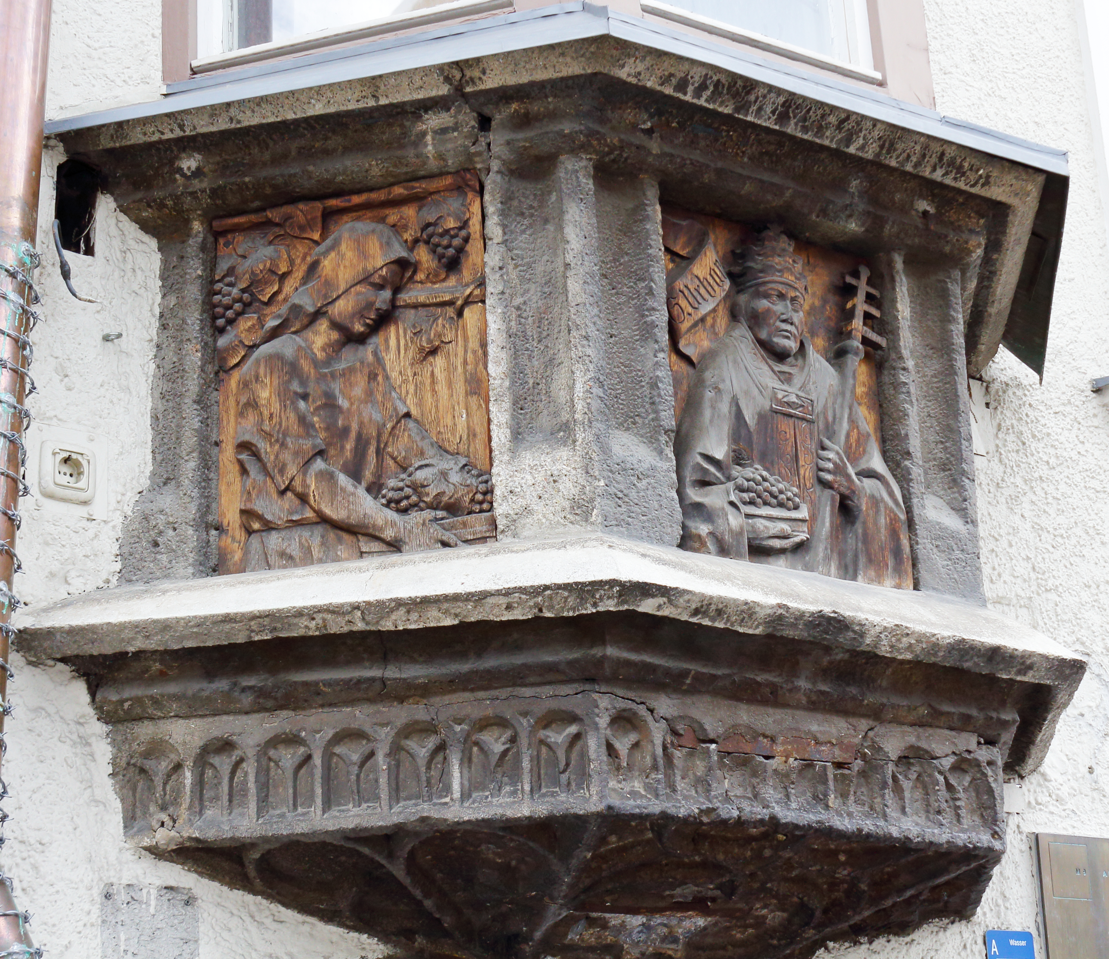 Relief am Erker des Hauses Maria-Theresien-Straße 9 in Innsbruck (Andreas Einberger, 1925)